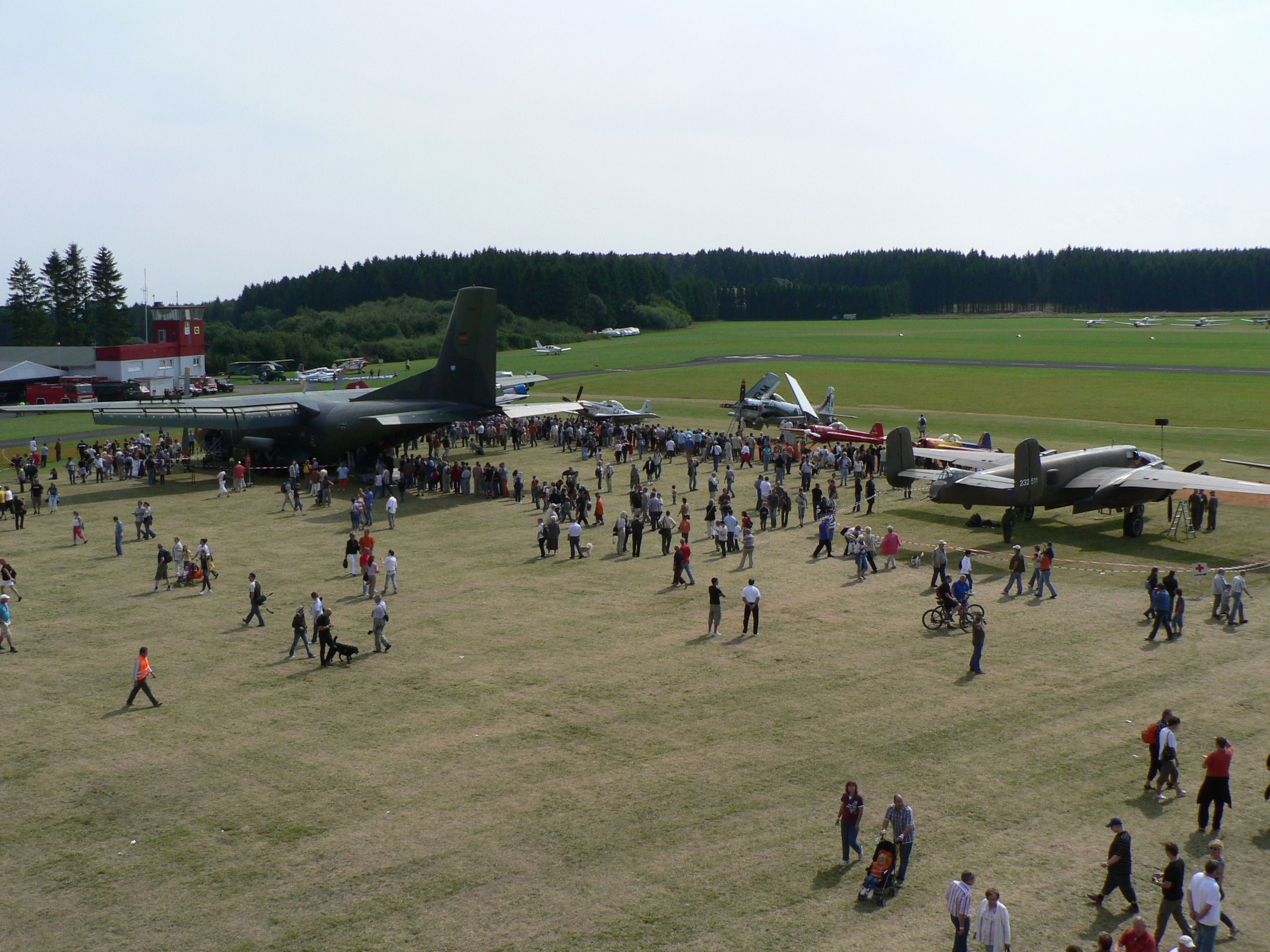 Flugtag auf dem Flugplatz Breitscheid 2008, Eigenes Foto